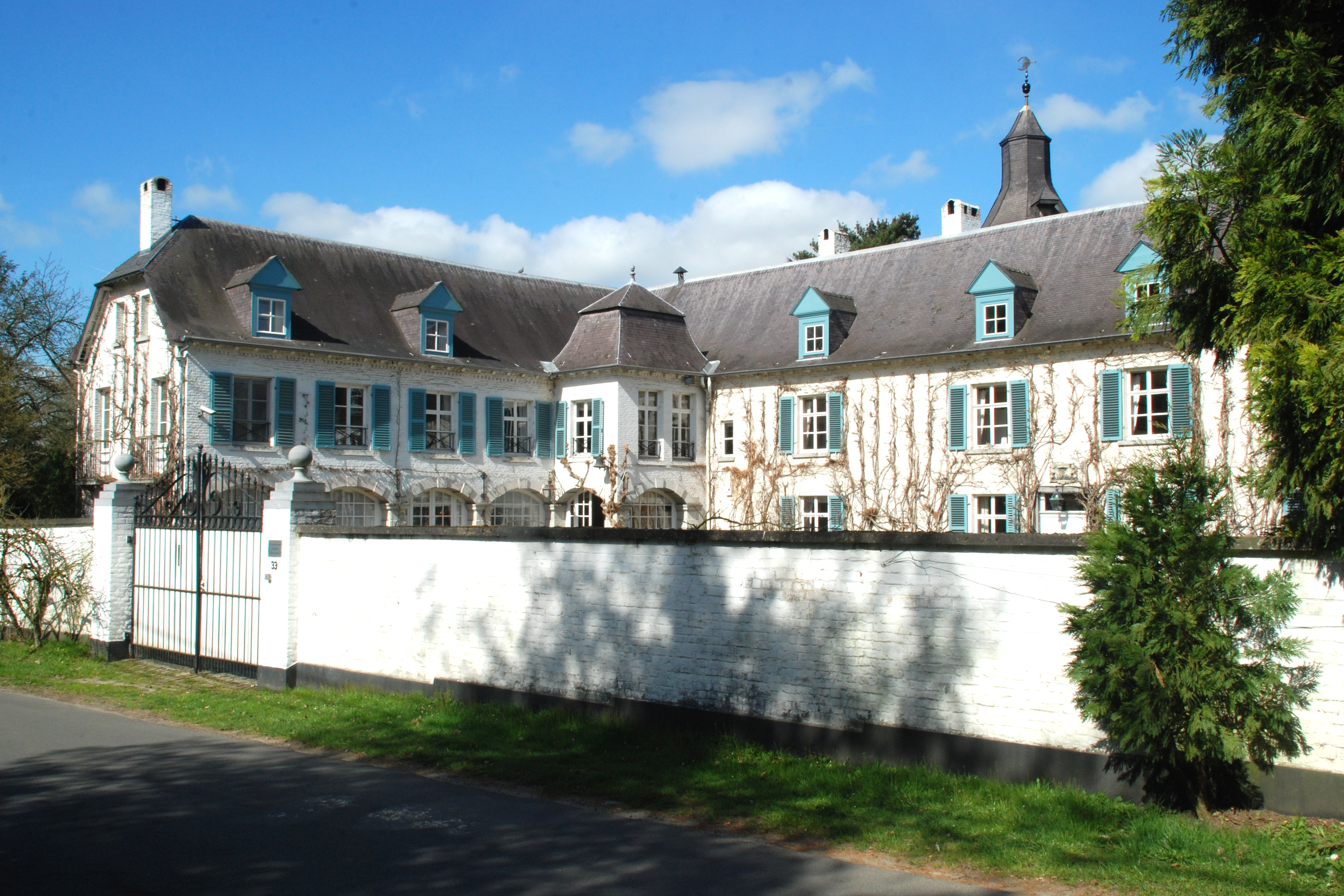 Belgique - Brabant wallon - Château de Bousval